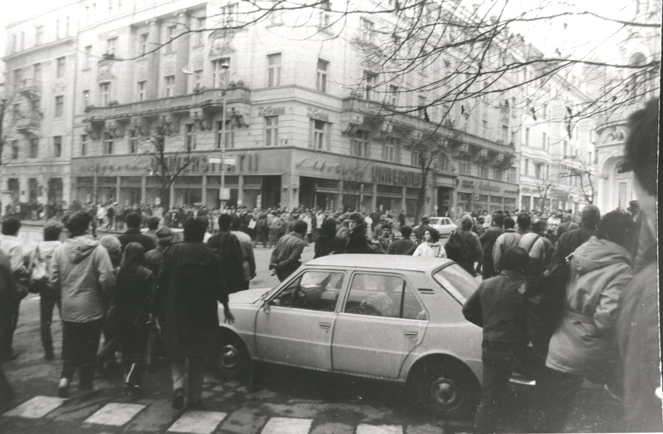 Această poză a fost realizată de către Răzvan Rotta în zilele revoluţiei din 1989. Cătălin Bogdan a cerut acestuia să transmită în domeniu public cele 21 de poze iar dânsul şi-a dat acordul; ulterior acest acord de publicare a fost trimis confirmat către d-nul Rotta, pe data de 5 aprilie 2010, la adresa - vezi tichetul 2010032110014341)